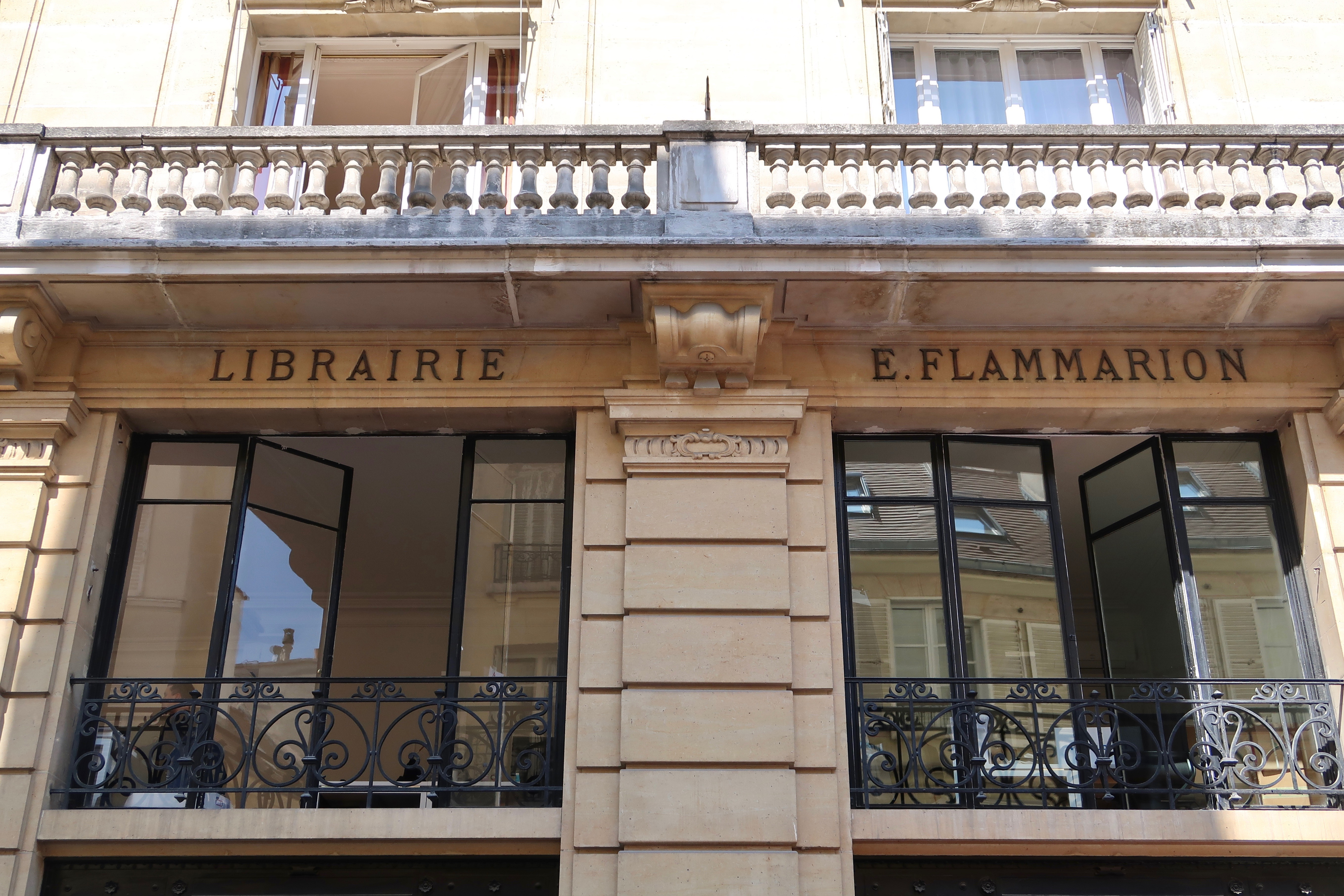 Librairie Flammarion, 26 rue Racine (Paris, 6e).